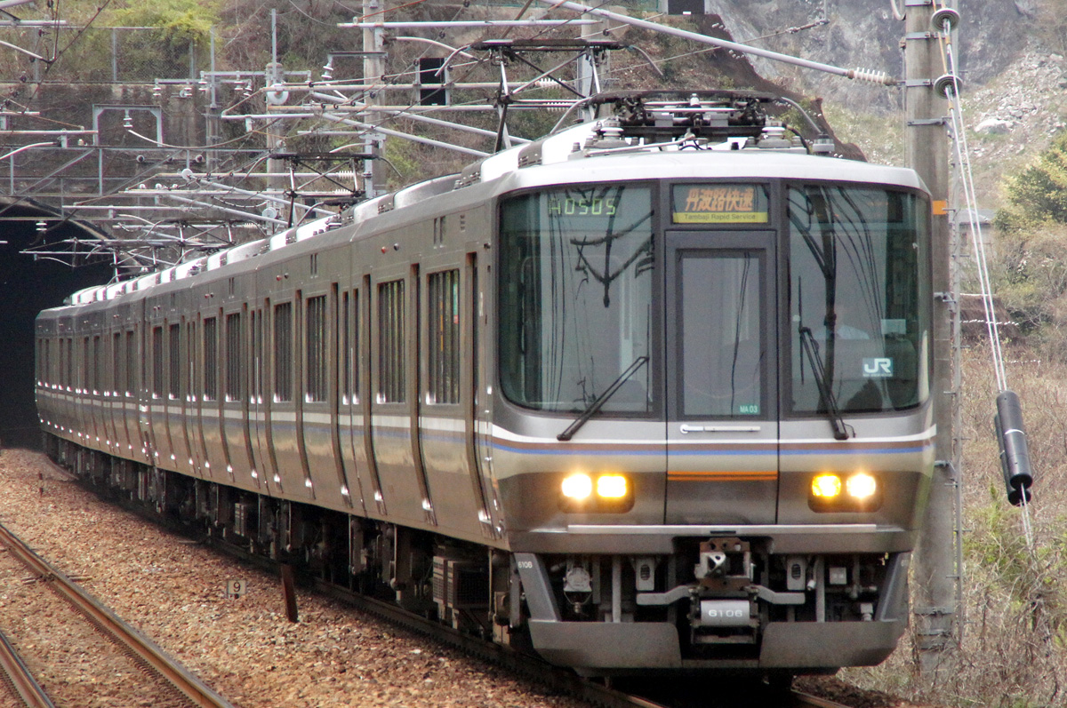 JR西日本223系6000番台（JR宝塚線）